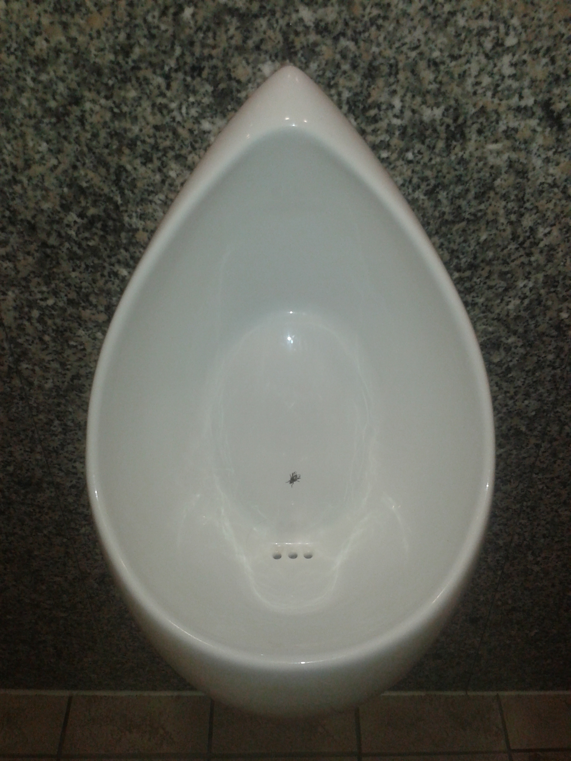 Toilette/Pissoir in Restaurant mit Fliegen als "Ziel" (siehe Nudge)